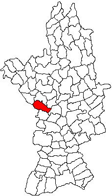 Categorie:Hărţi ale judeţului Olt